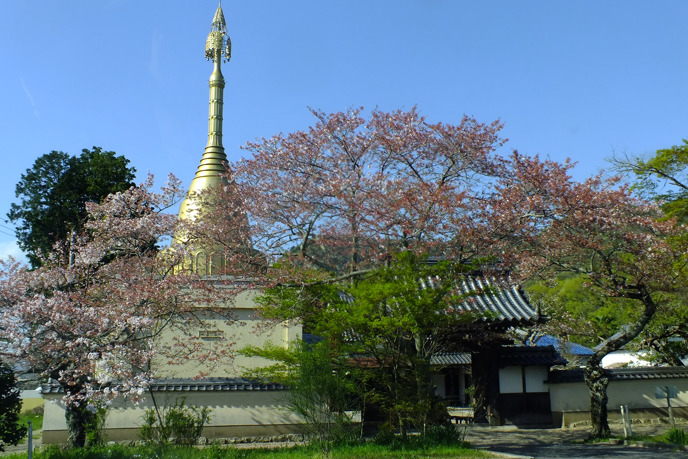 Houkouin,Nishiwaki 西脇市宝光院のパゴダと桜